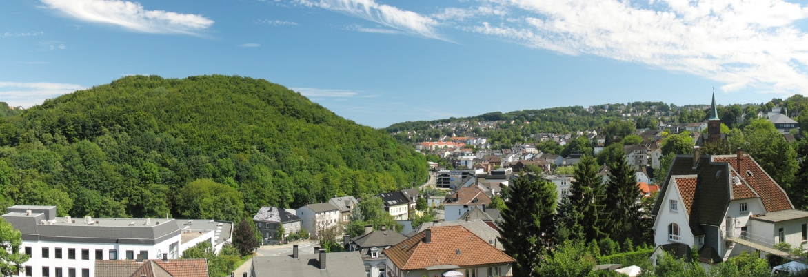 Ennepetal-Milspe im Sommer 2007, Panorama